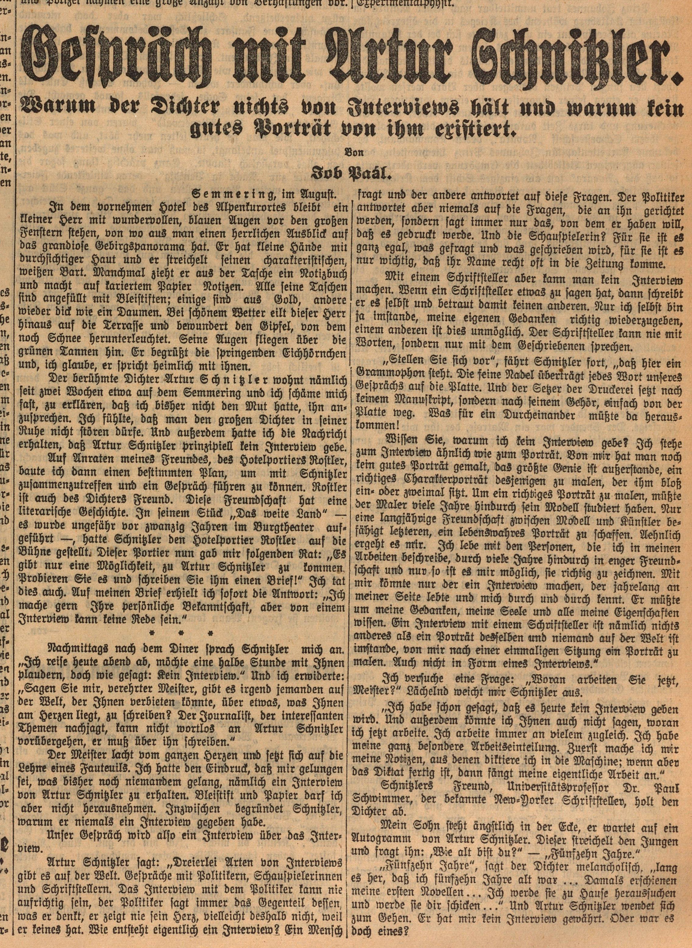 Job Paal interviewt Artur Schnitzler – August 1931. Schnitzler wurde damals ohne das "h" geschrieben.